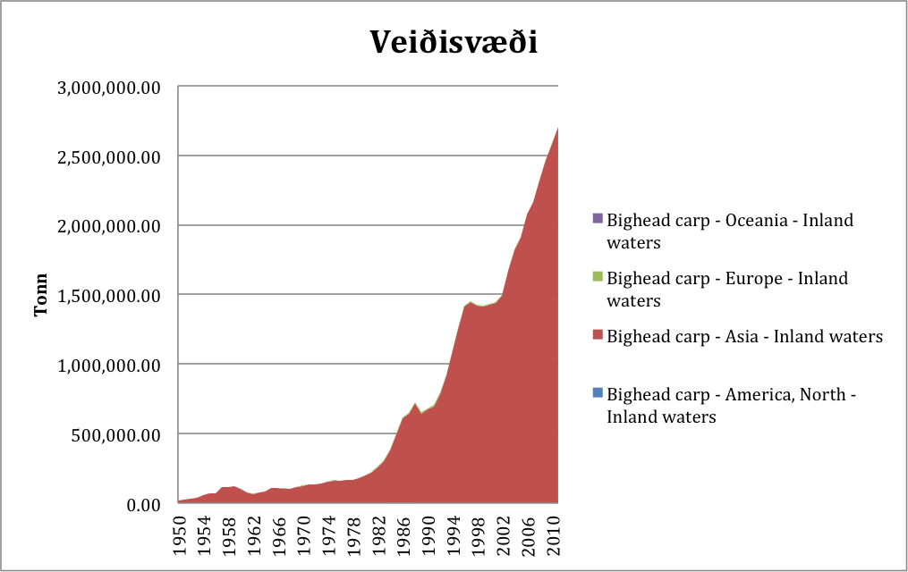 Veiðisvæði